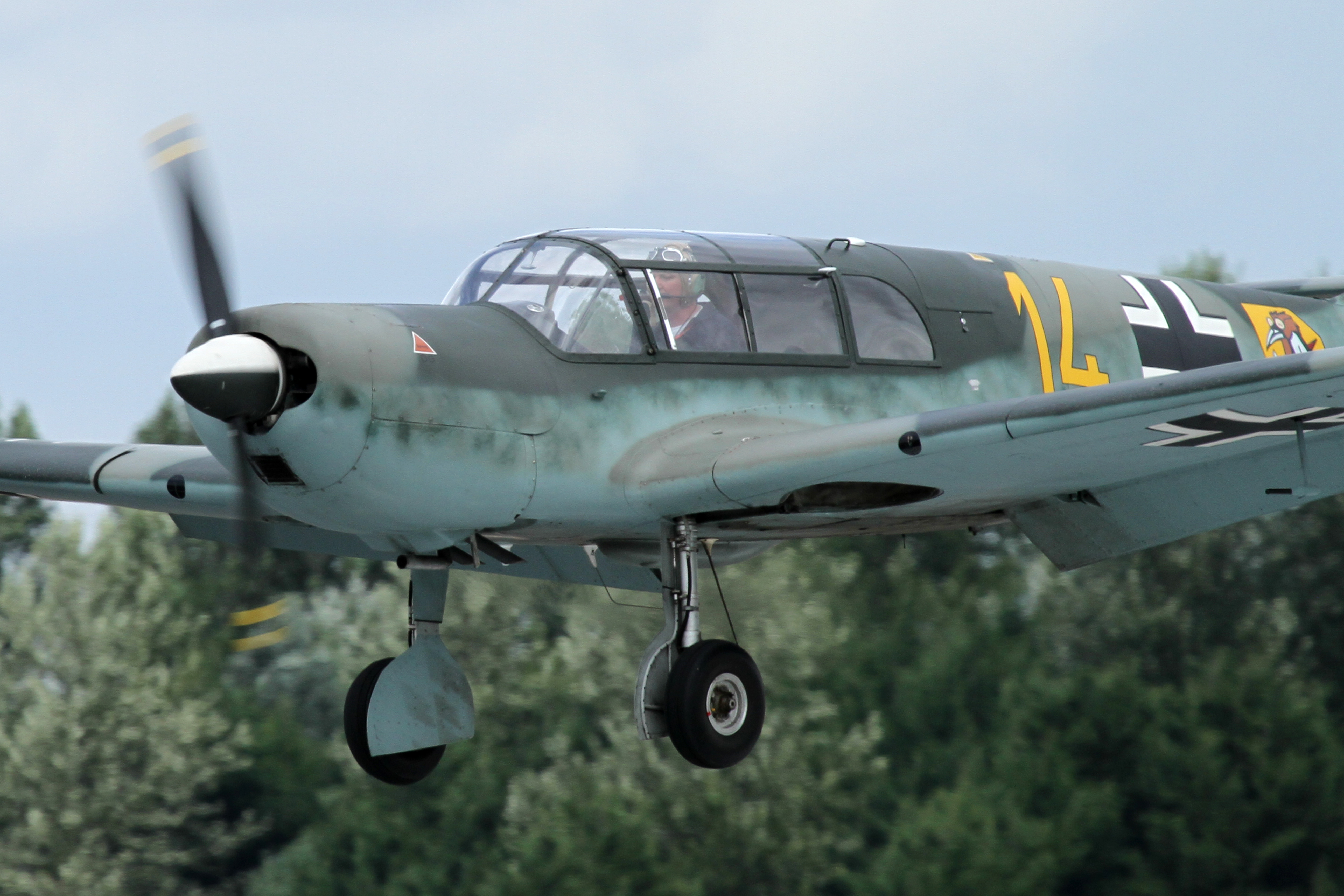 Messerschmitt 108 Taifun 02